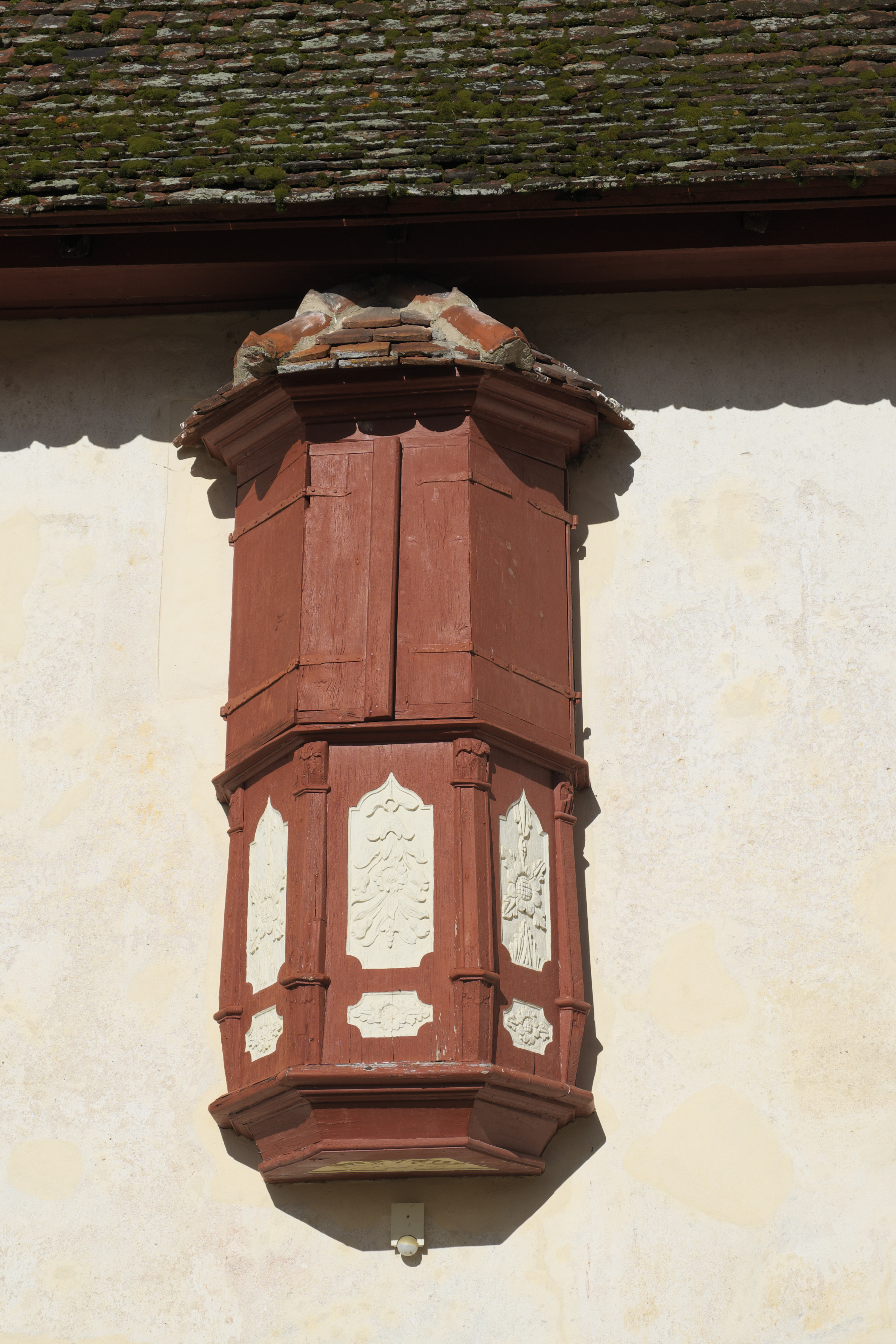 Veitskapelle, ehemaliges Beinhaus, in Mühlheim an der Donau im Landkreis Tuttlingen (Baden-Württemberg/Deutschland), Holzerker